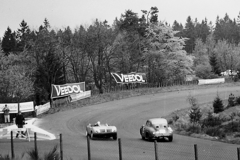 1000-km-Rennen auf dem Nürburgring 1962. Porsche 718 W-RS überholt Porsche 356 B von Glemser/Wütherich in der Südkehre. Eigenes Foto, von altem Papierbild gescannt